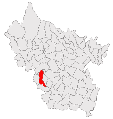 Categorie:Hărţi ale judeţului Buzău